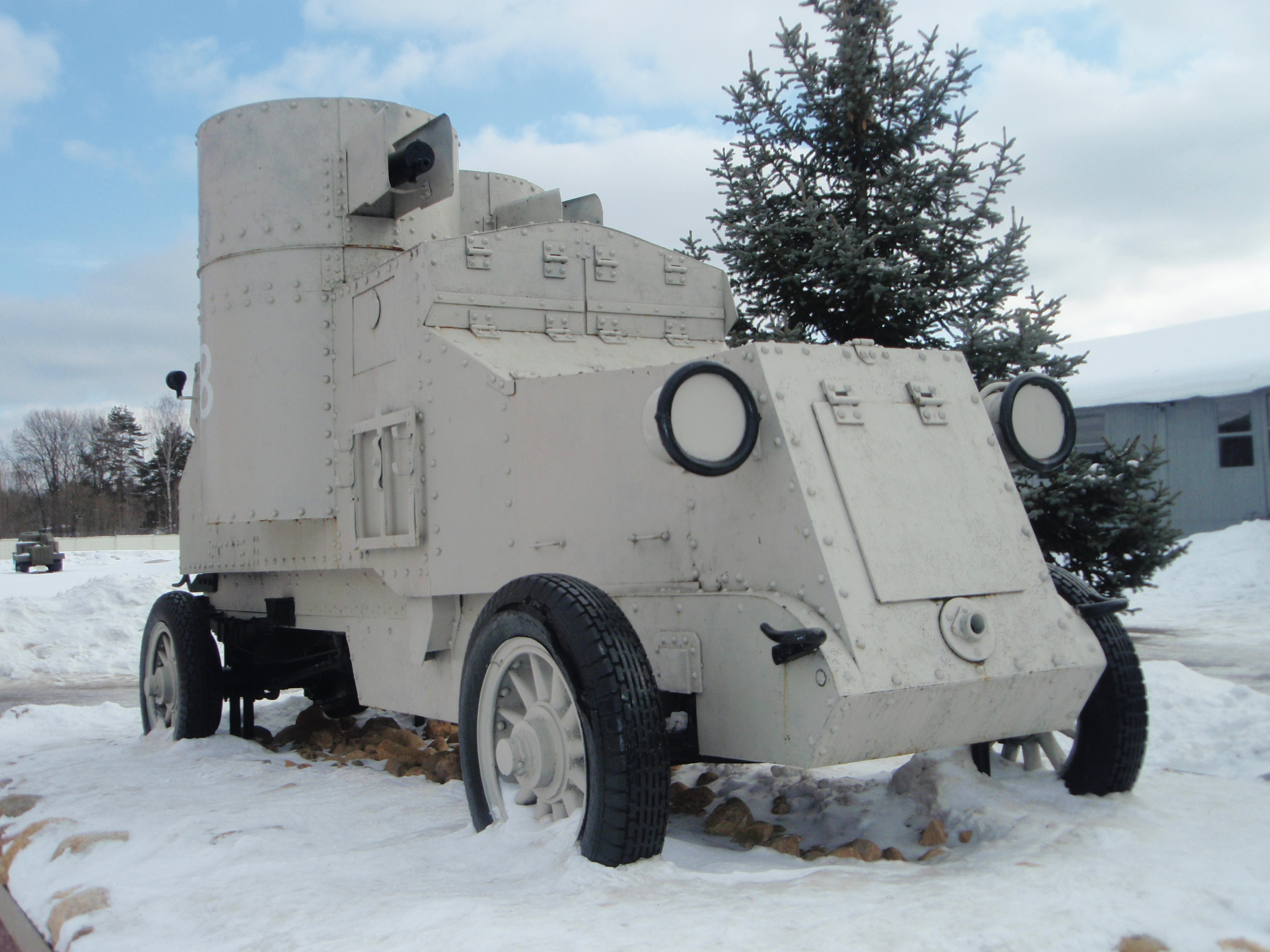 Бронеавтомобиль Остин (русский) в Кубинке